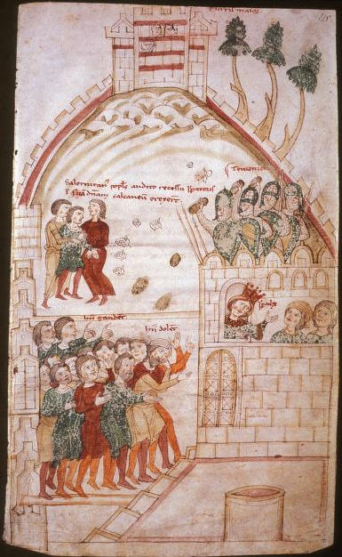 Konstancie Sicilská v Salernu (l'imperatrice e regina di Sicilia Costanza d'Altavilla a Salerno)